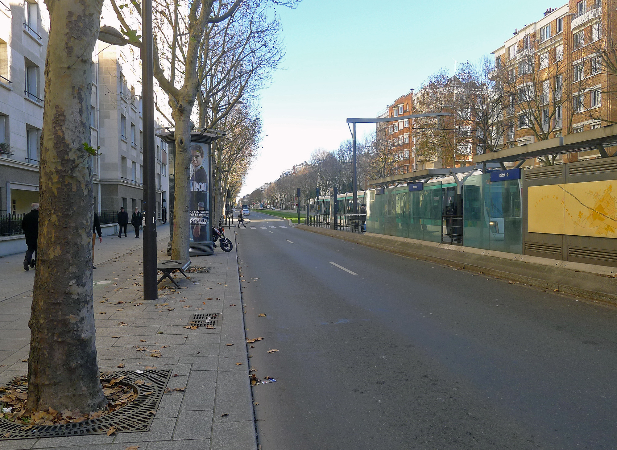 Boulevard Brune au niveau de la station du tramway T3a "Didot" - Paris XIV